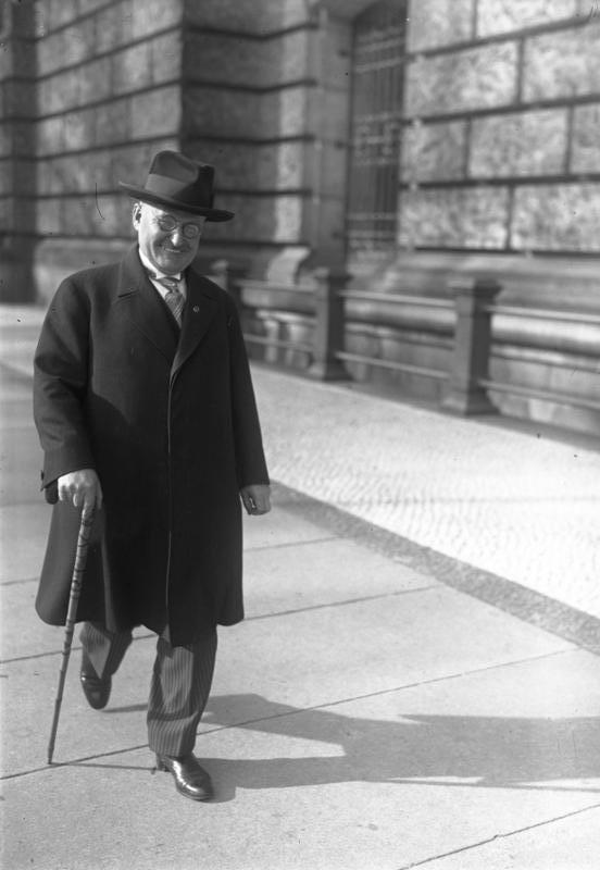 Die Wahl des Reichstagspräsidenten in Berlin! Aufnahmen prominenter Parlamentarier auf dem Wege zum Reichstag zur Wahl des Reichstagspräsidenten! Der frühere Reichstagspräsident Paul Löbe, welcher um seine Wiederwahl kämpft, auf dem Wege zum Reichstag.